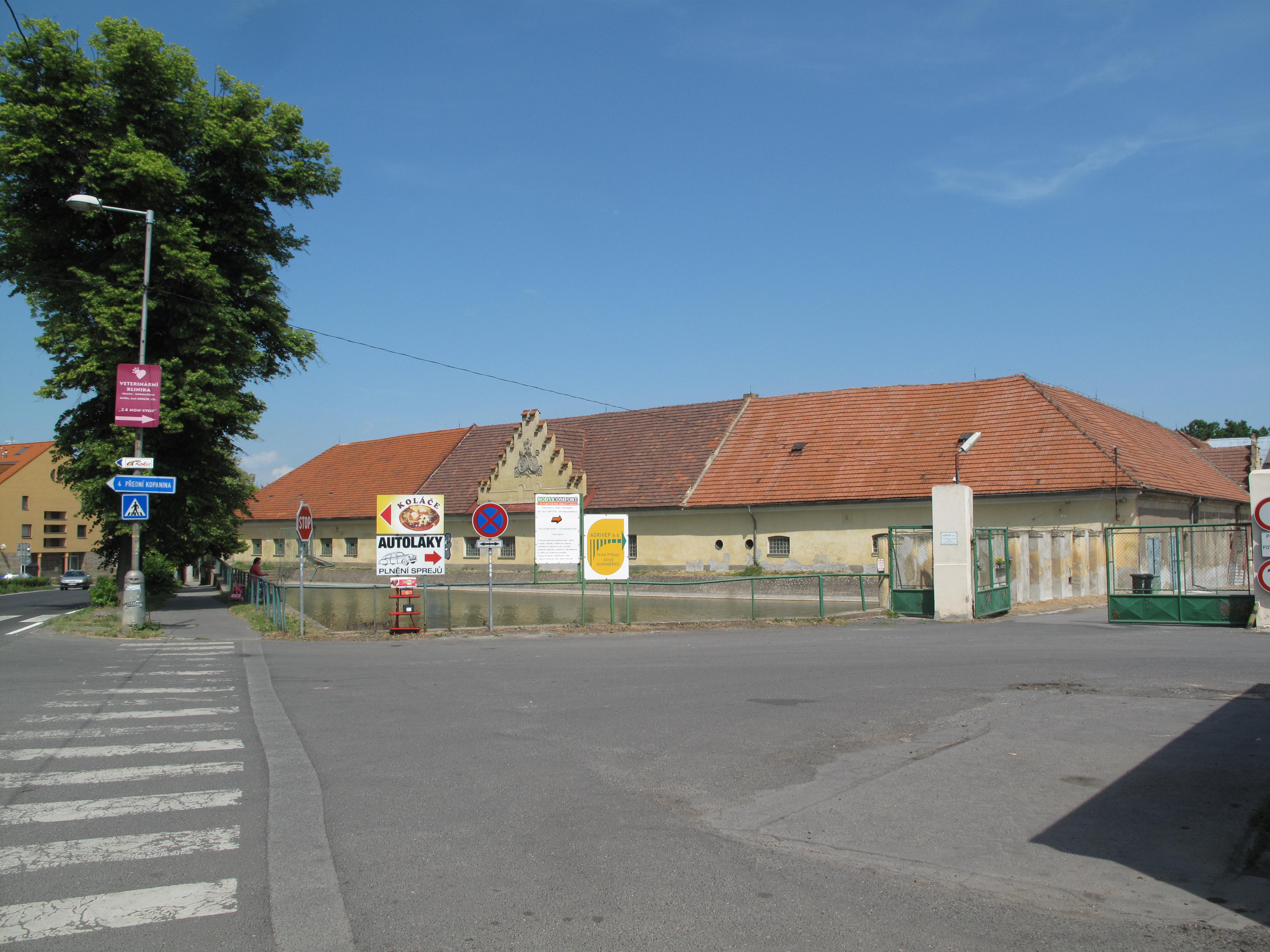 Horoměřice